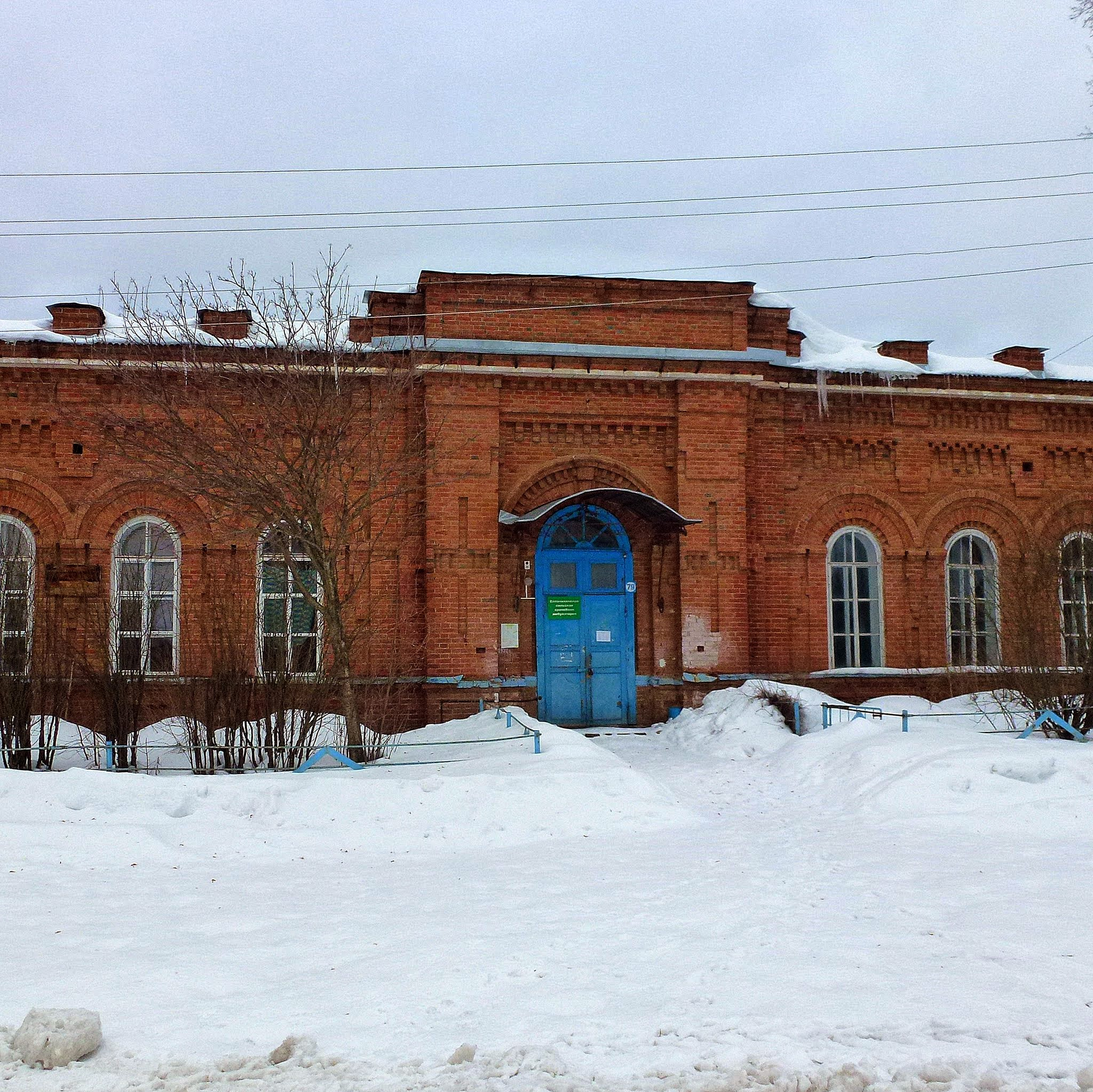 Епанчихинская сельская врачебная амбулатория, Пермский край